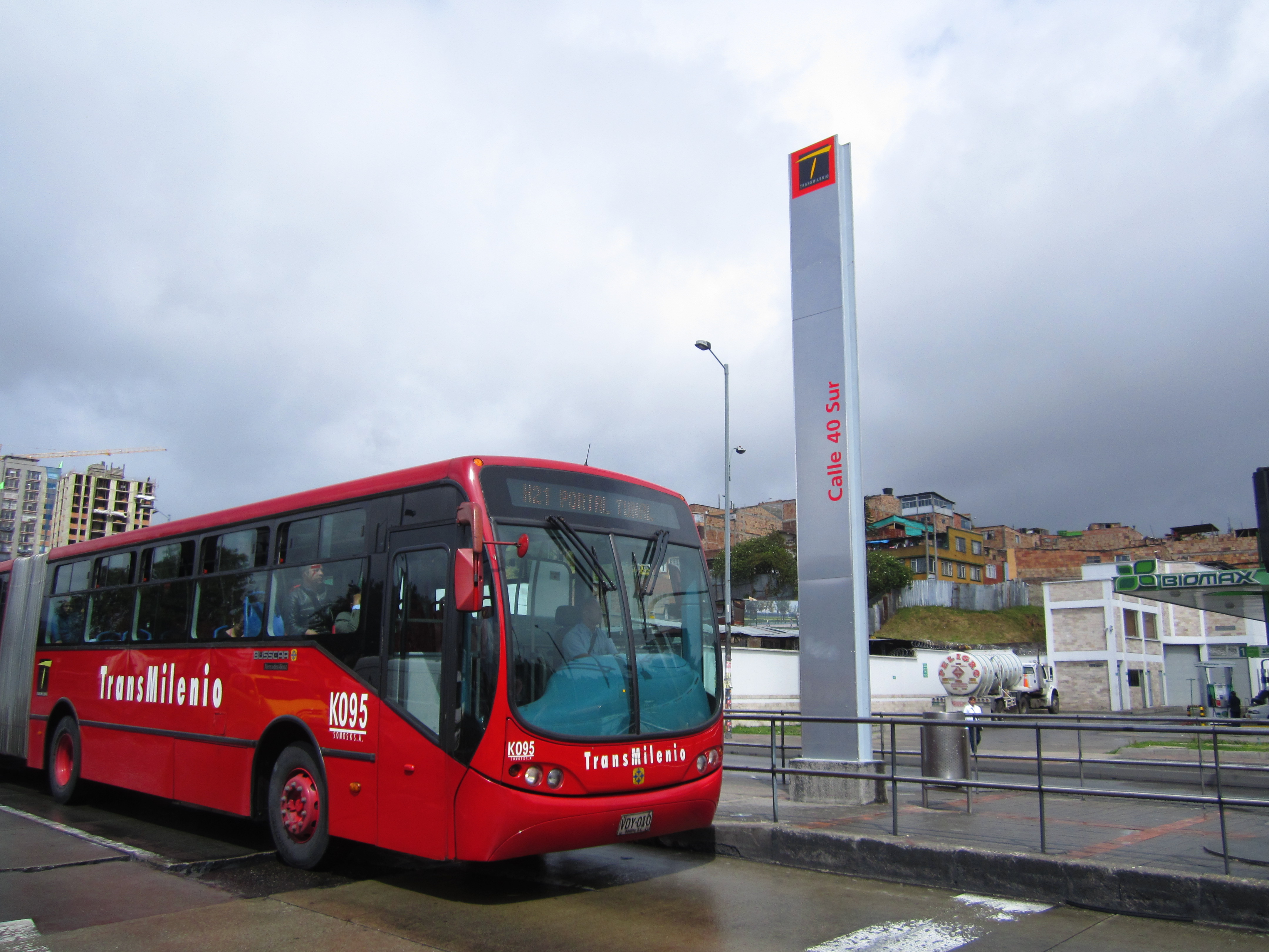 Bogotá estación de TransMilenio Calle 40 Sur.